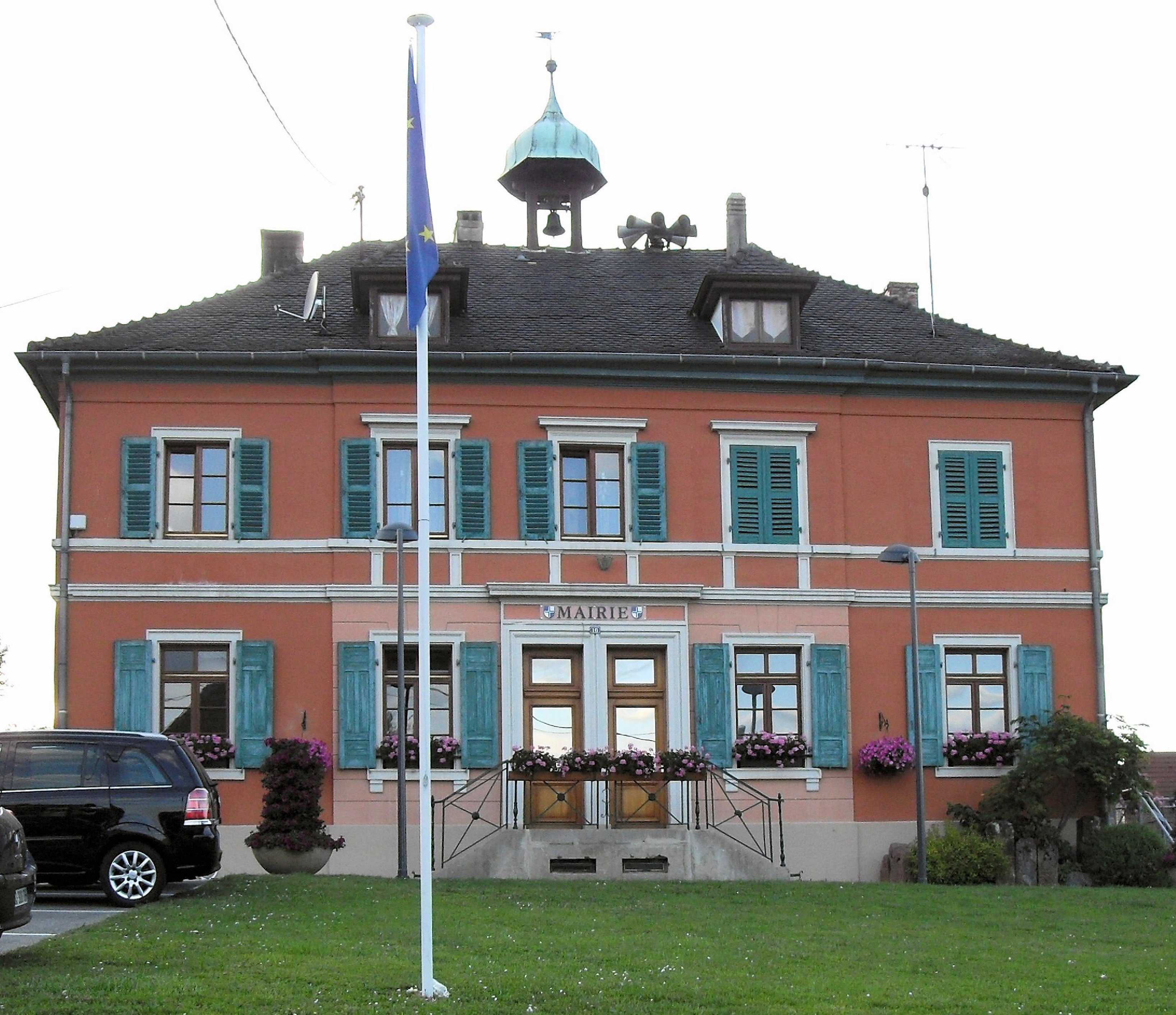 La mairie d'Hindlingen